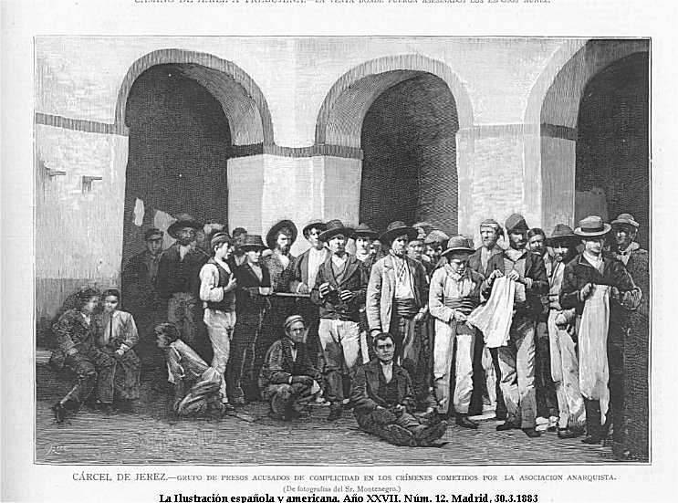 Carcel de Jerez - grupo de presos acusados de complicidades en los crimenes cometidos por la asociacion anarquista.